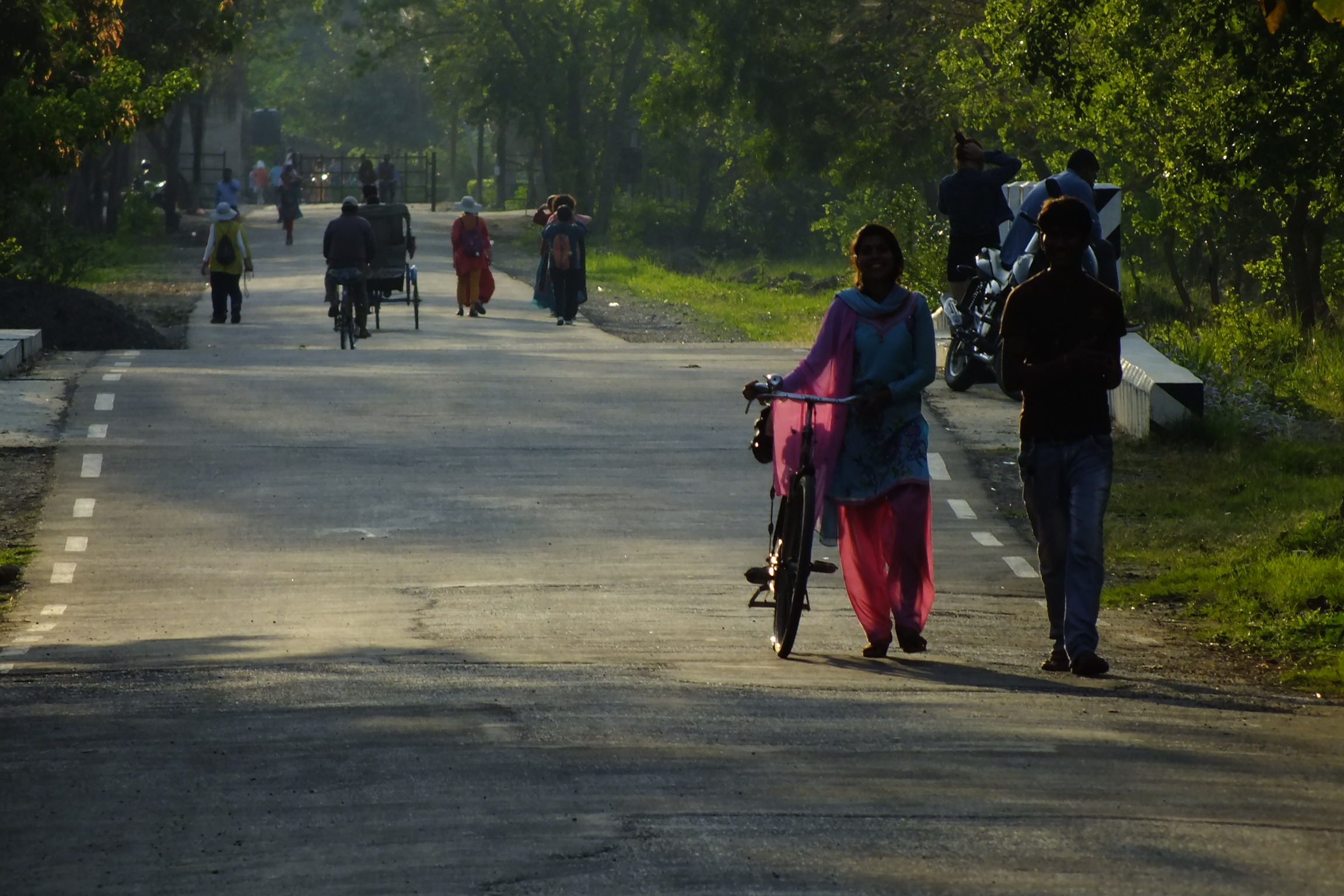 2015-03-16 Sacred Garden Zone,Lumbini 聖園地区